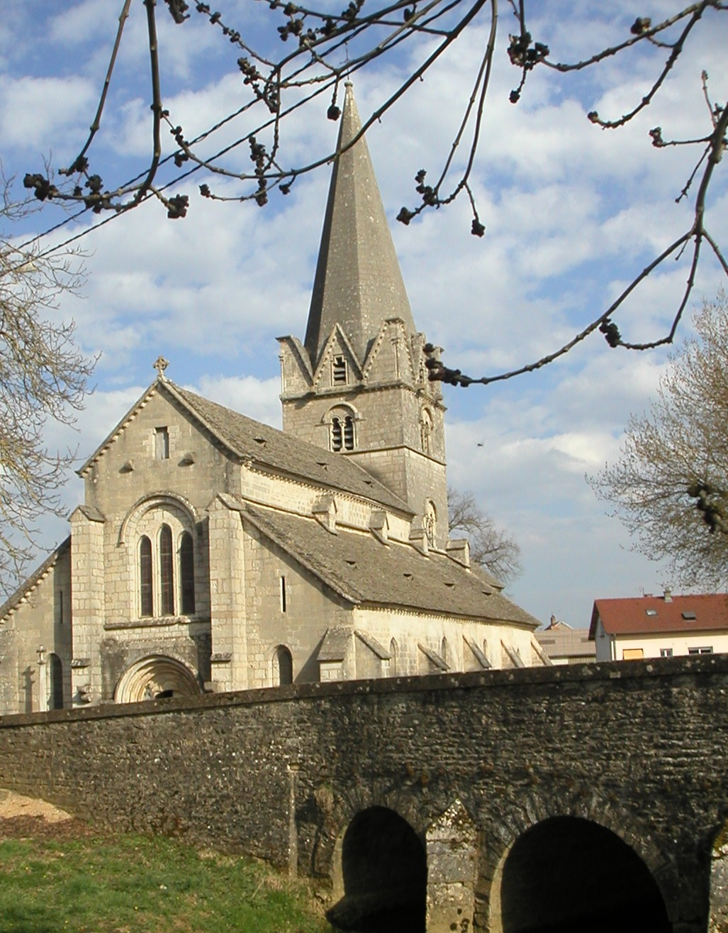 Extérieur de l'église d'Isomes